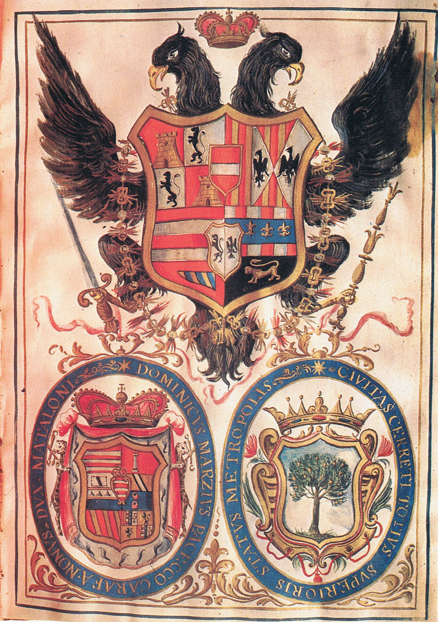 pagina di un manoscritto del 1725 (Statuti di Cerreto Sannita) conservato presso la Biblioteca Nazionale di Napoli